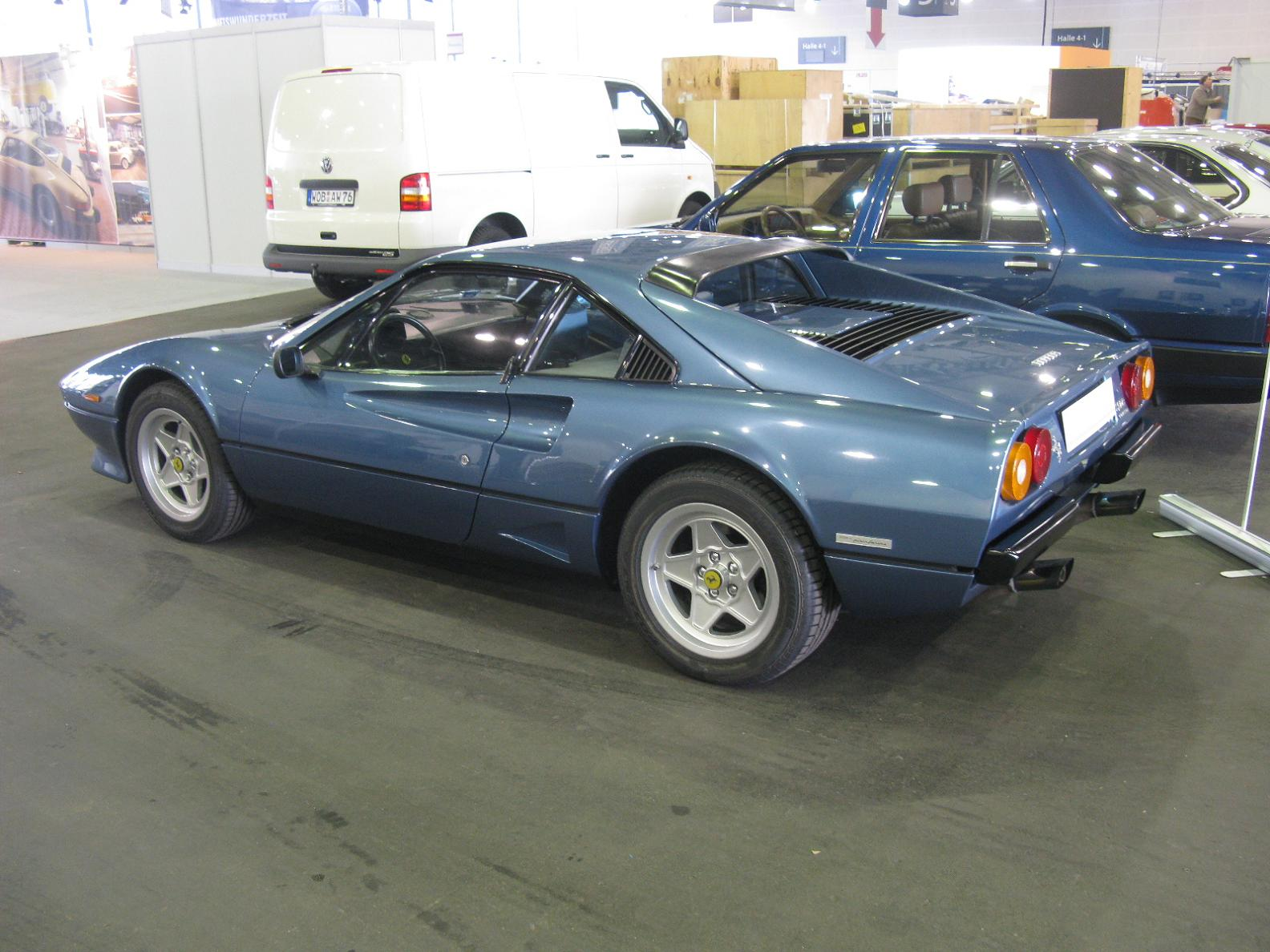 Ferrari 208 Turbo